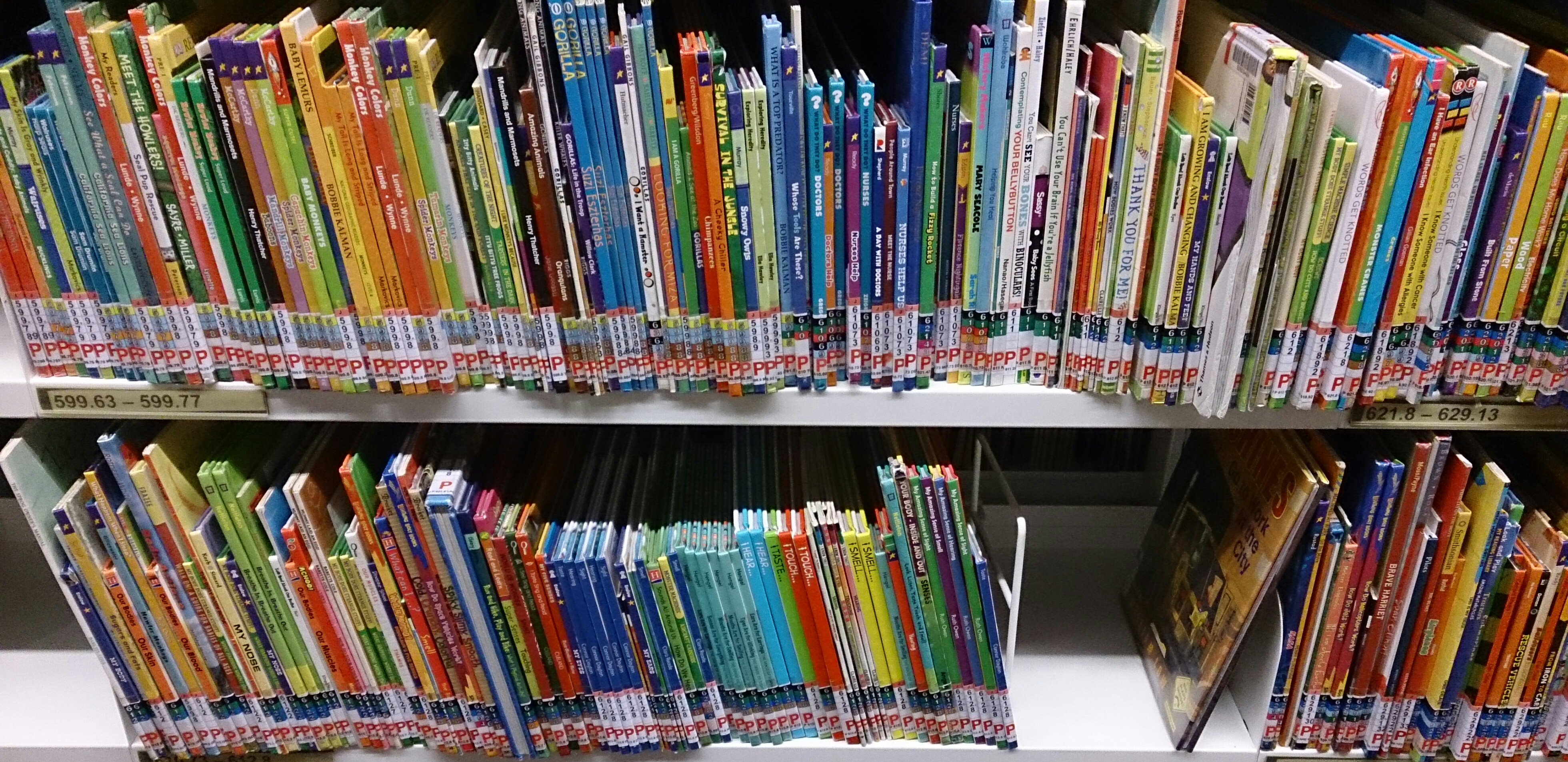 children books